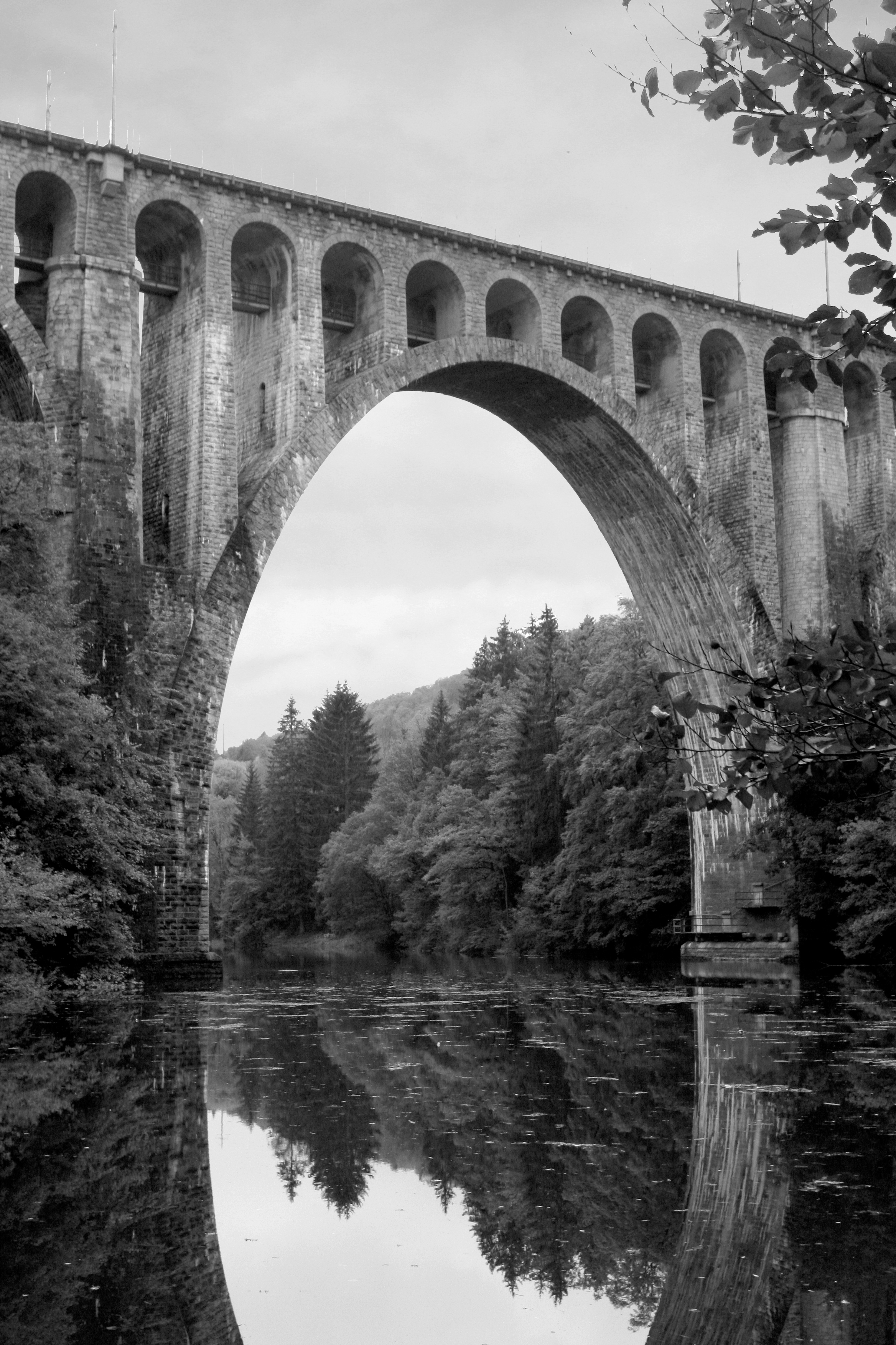 Viaduc du Day